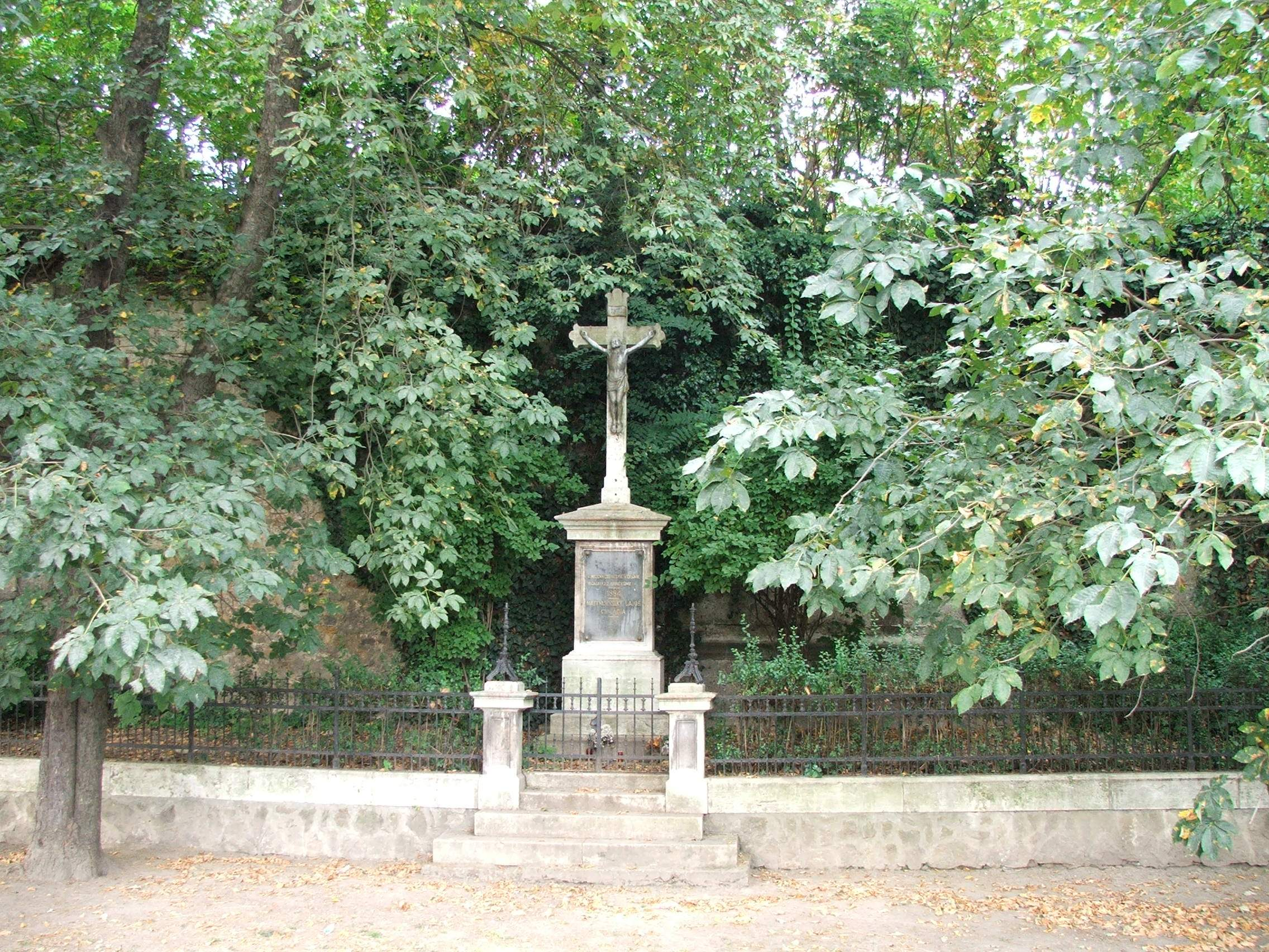 Mattyasovszky-kereszt. (1894)- Magyarország, Komárom-Esztergom megye, Esztergom Kis-Duna sétány (A várfal beszögelésében, egy kovácsoltvas kerítés mögött).